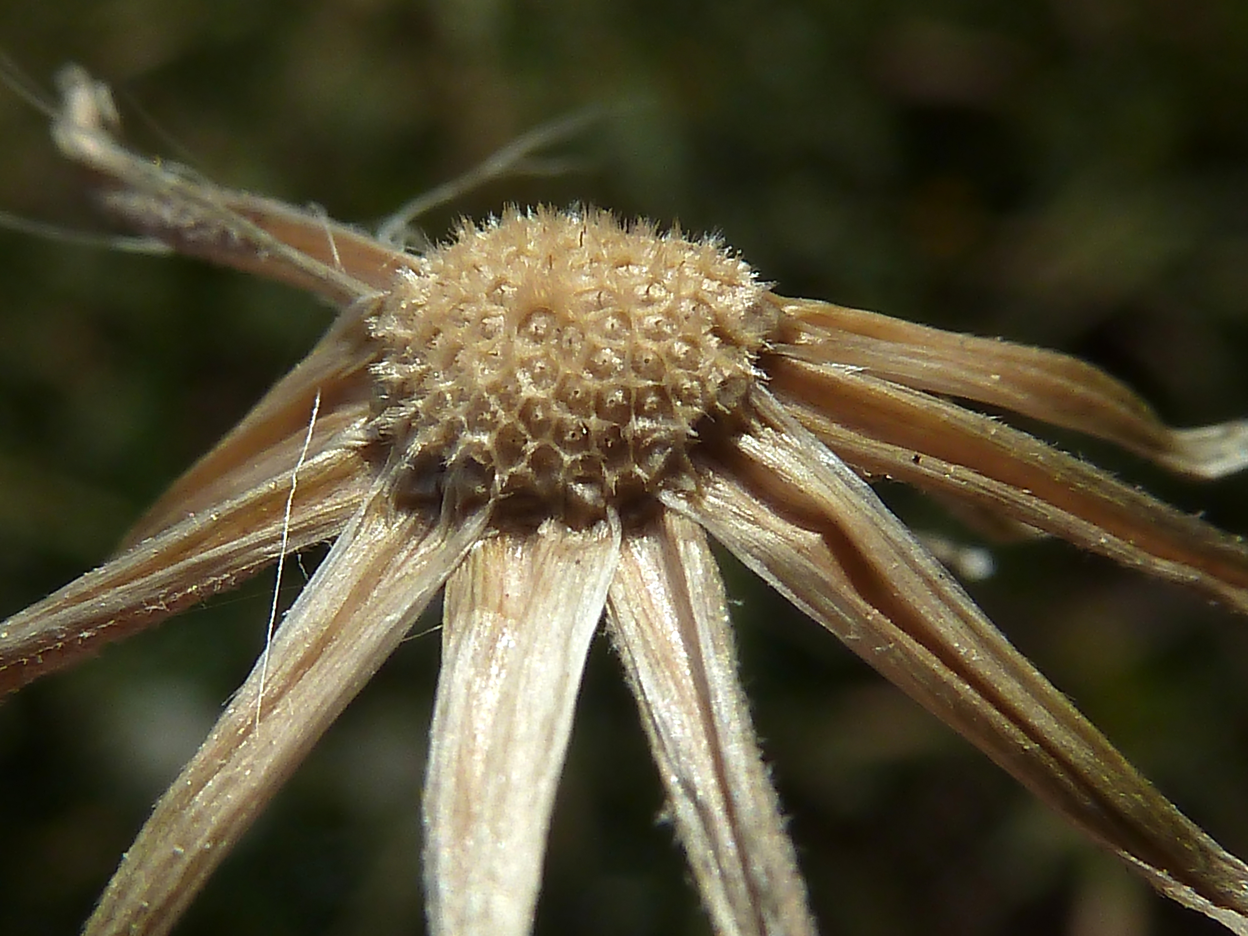 Crepis vesicaria (achicoria, escoba de hojera, lecherina) - Receptáculo alveolado. - La Huerta, Albatera (Provincia de Alicante, España).